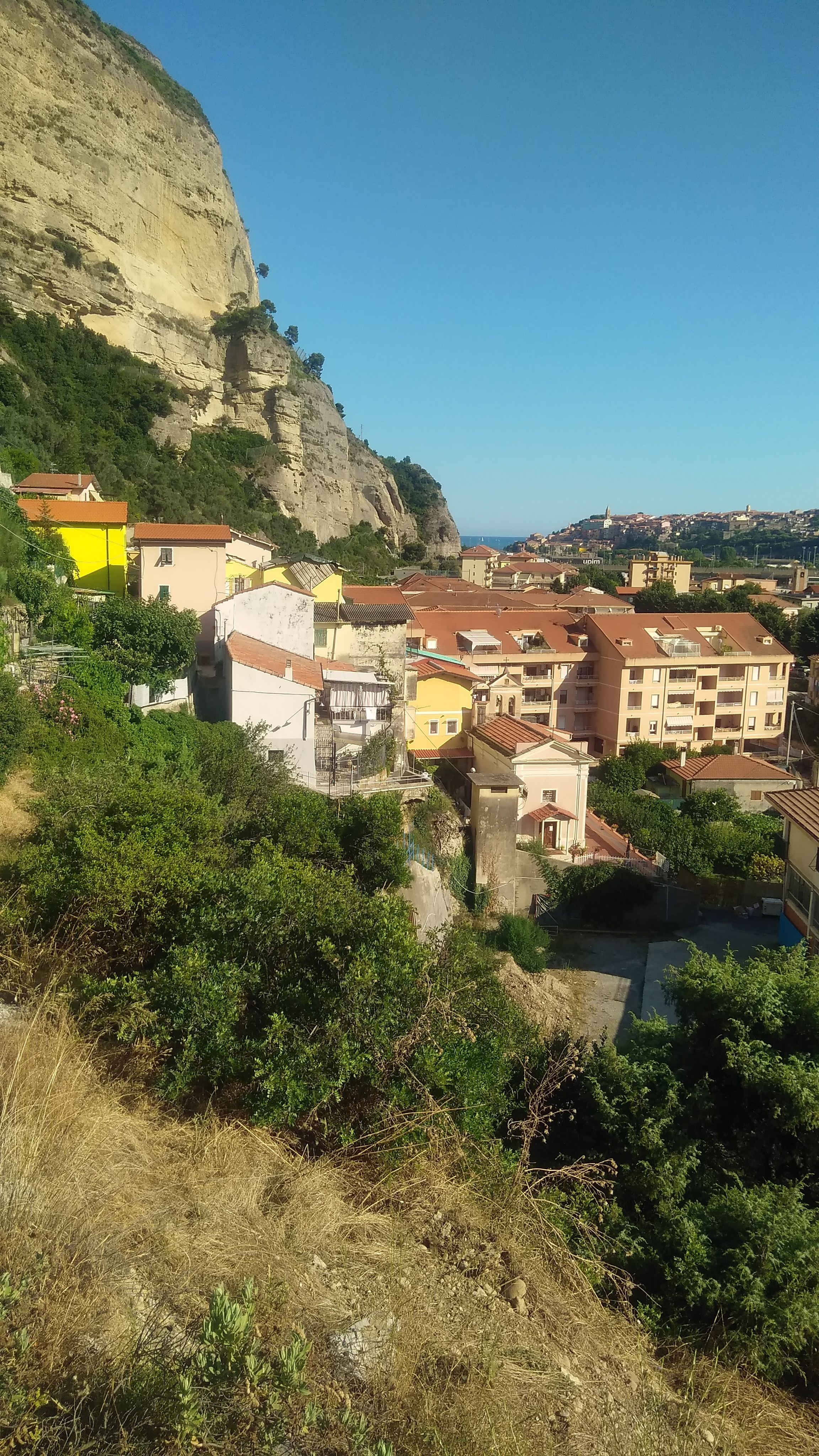 Roverino (Q49961358)